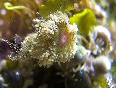 Stichodactyla tapetum. Recorte de Stapetum 1